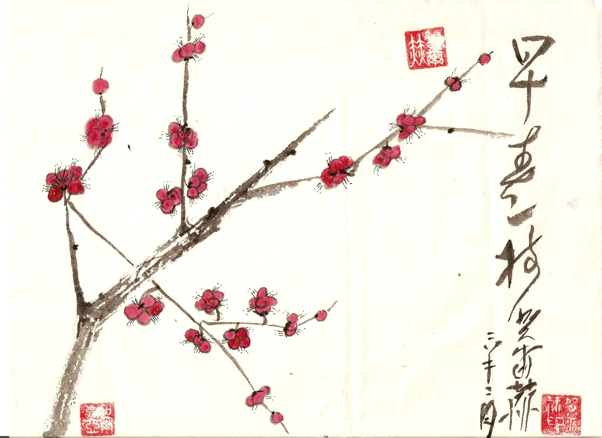 pintra estilo Xieyi